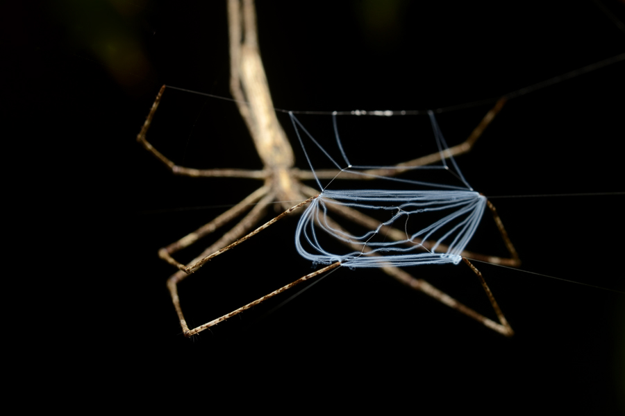 Deinopidae: Deinopis sp. Isla Colón, Bocas del Toro, Panama